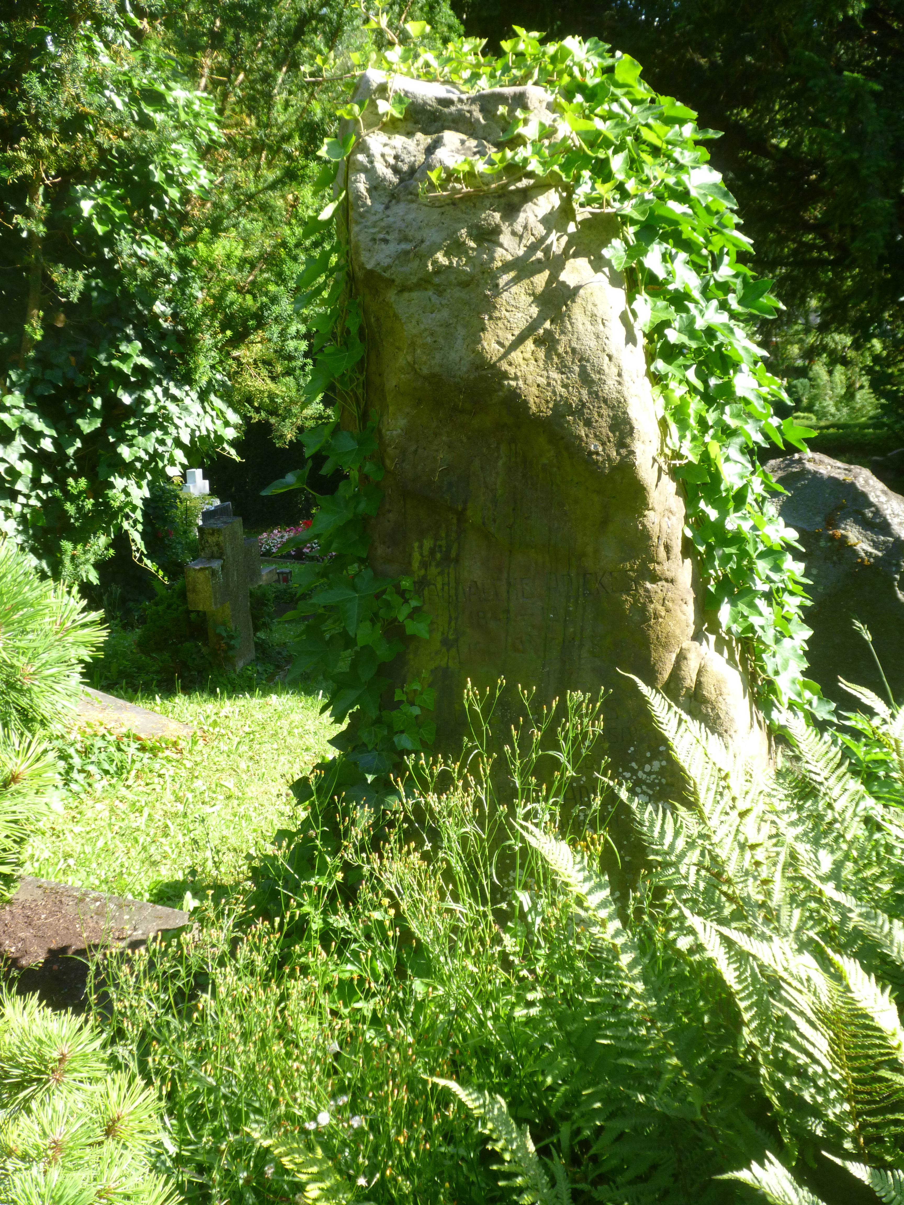 Erich Adickes Stadtfriedhof Tübingen